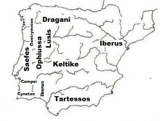 Povos_Ibéricos_proto-históricos.jpg (331 × 244 pixels, tamanho: 30 KB, tipo MIME: image/jpeg) Informação sobre mapa de dados de fontes proto-históricas: Heródoto, Hecateu de Mileto, Ora maritima, Éforo de Cime.. Ver mais